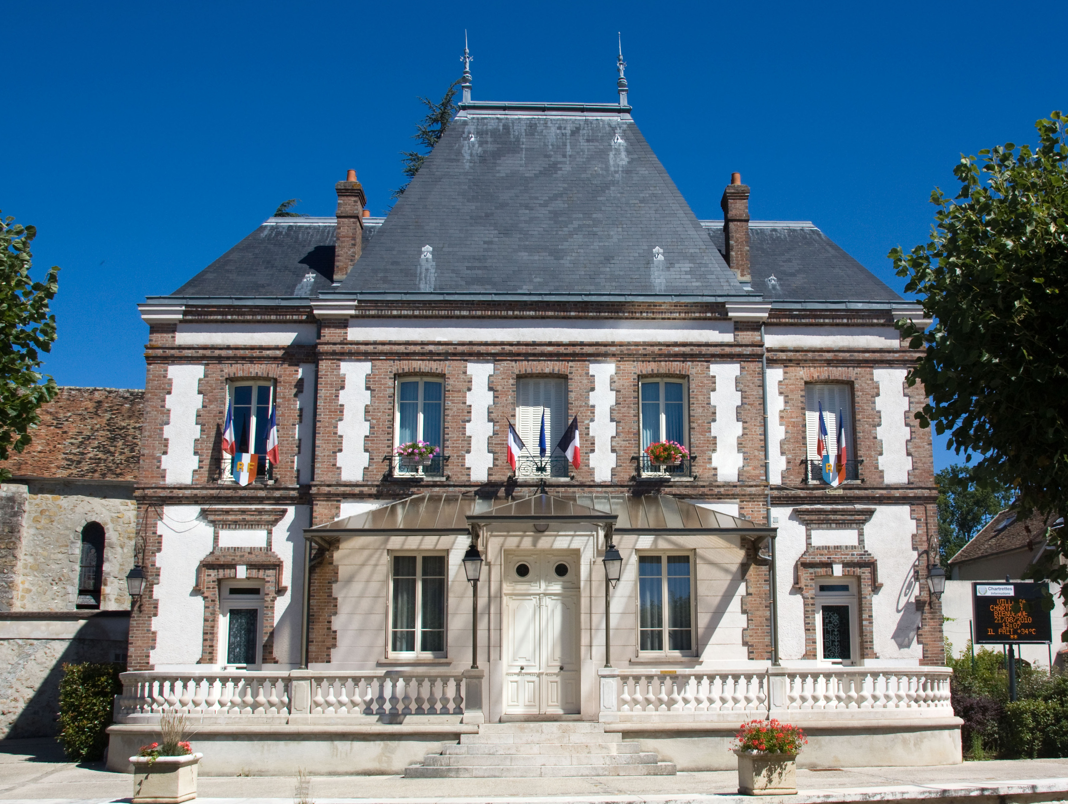 Mairie de Chartrettes, Seine-et-Marne, France